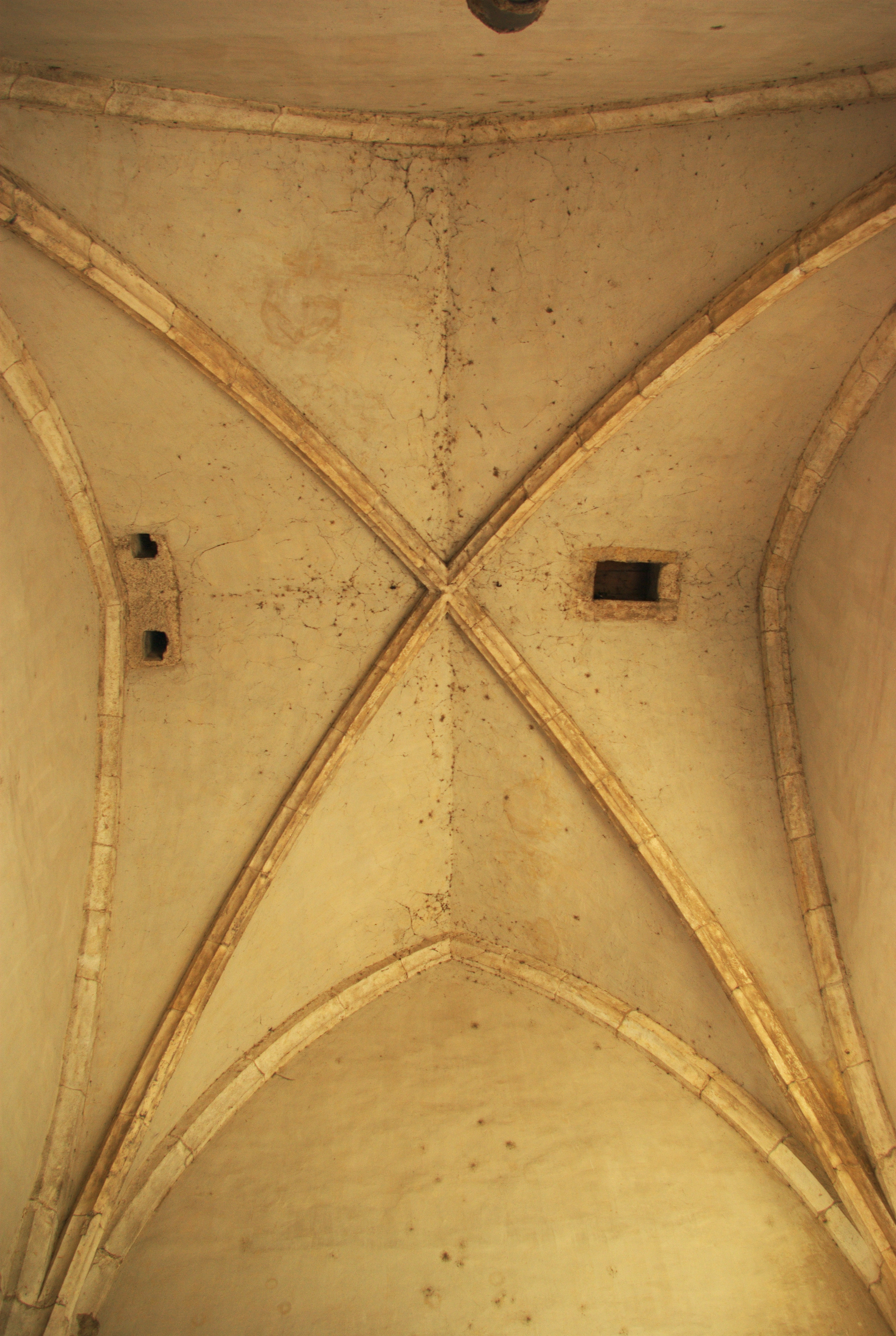 Kreuzgewoelbe im Torbogen des Ostentorturms in RegensburgThis is a photograph of an architectural monument.